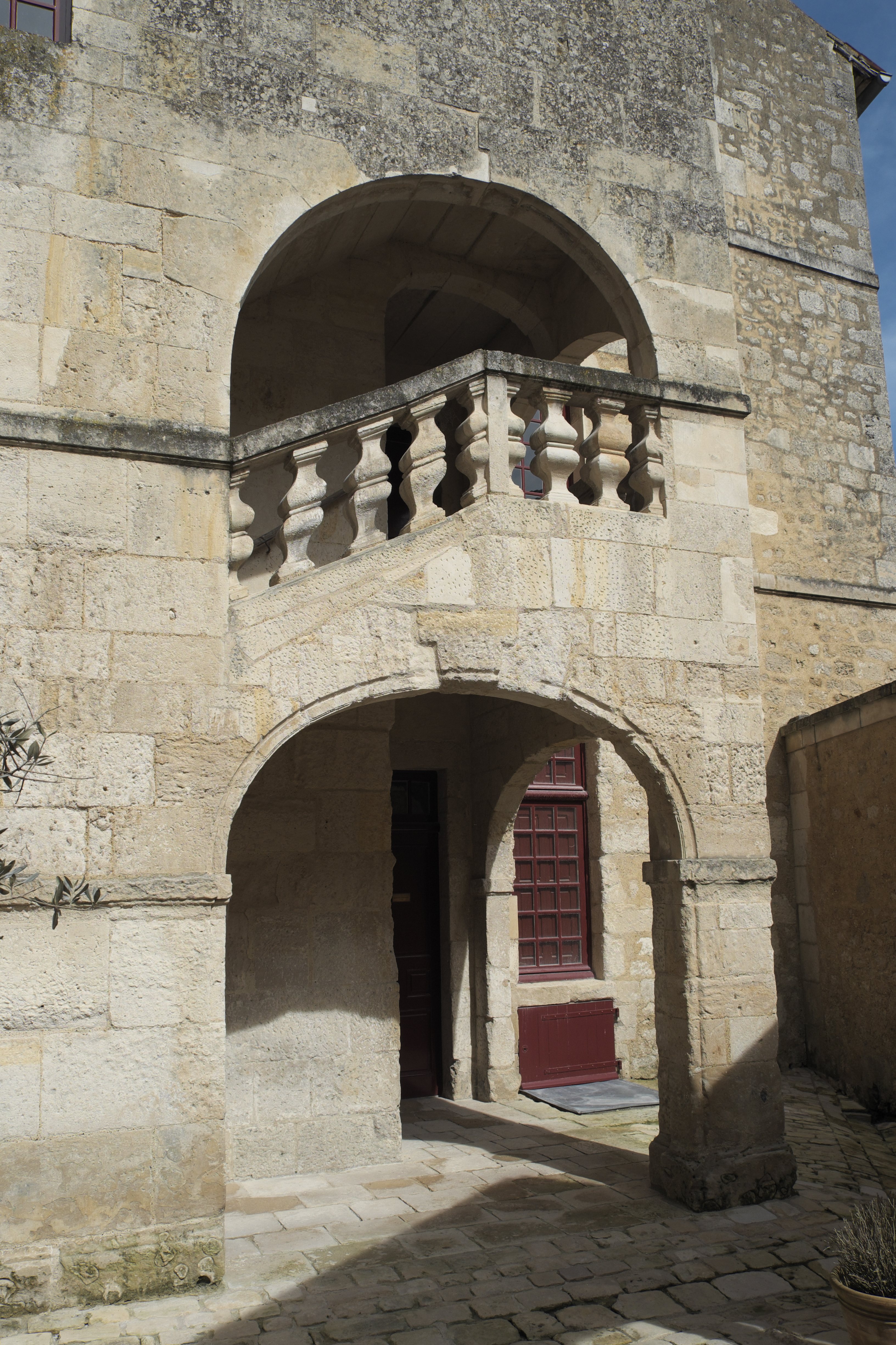 Stadtresidenz der Bischöfe von Maillezais, 9 rue du Pont-aux-Chèvres, in Fontenay-le-Comte im Département Vendée (Pays de la Loire/Frankreich)